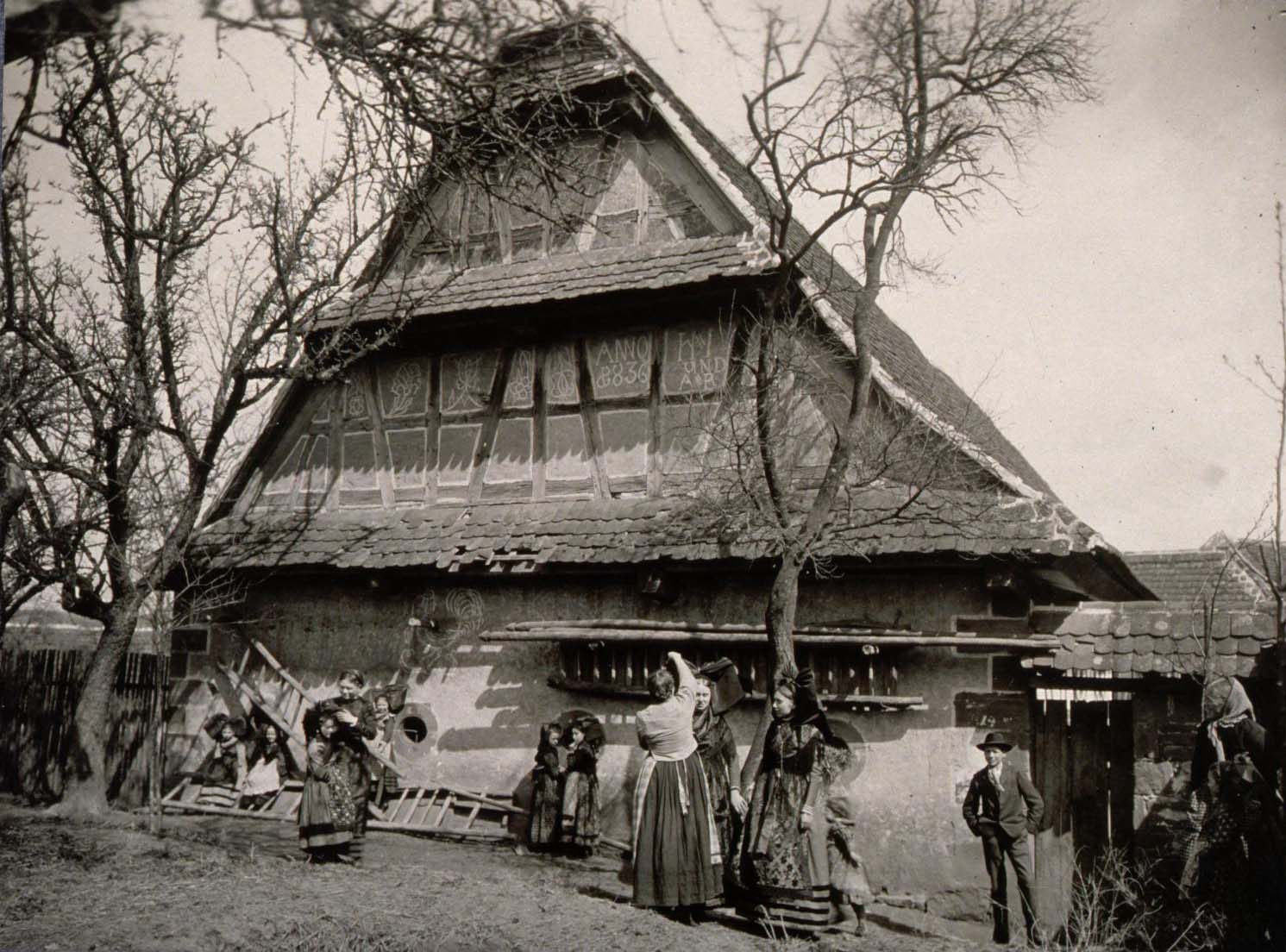 Vue sur l'arrière de la grange de la ferme Jacob à Buswiller, Alsace, France